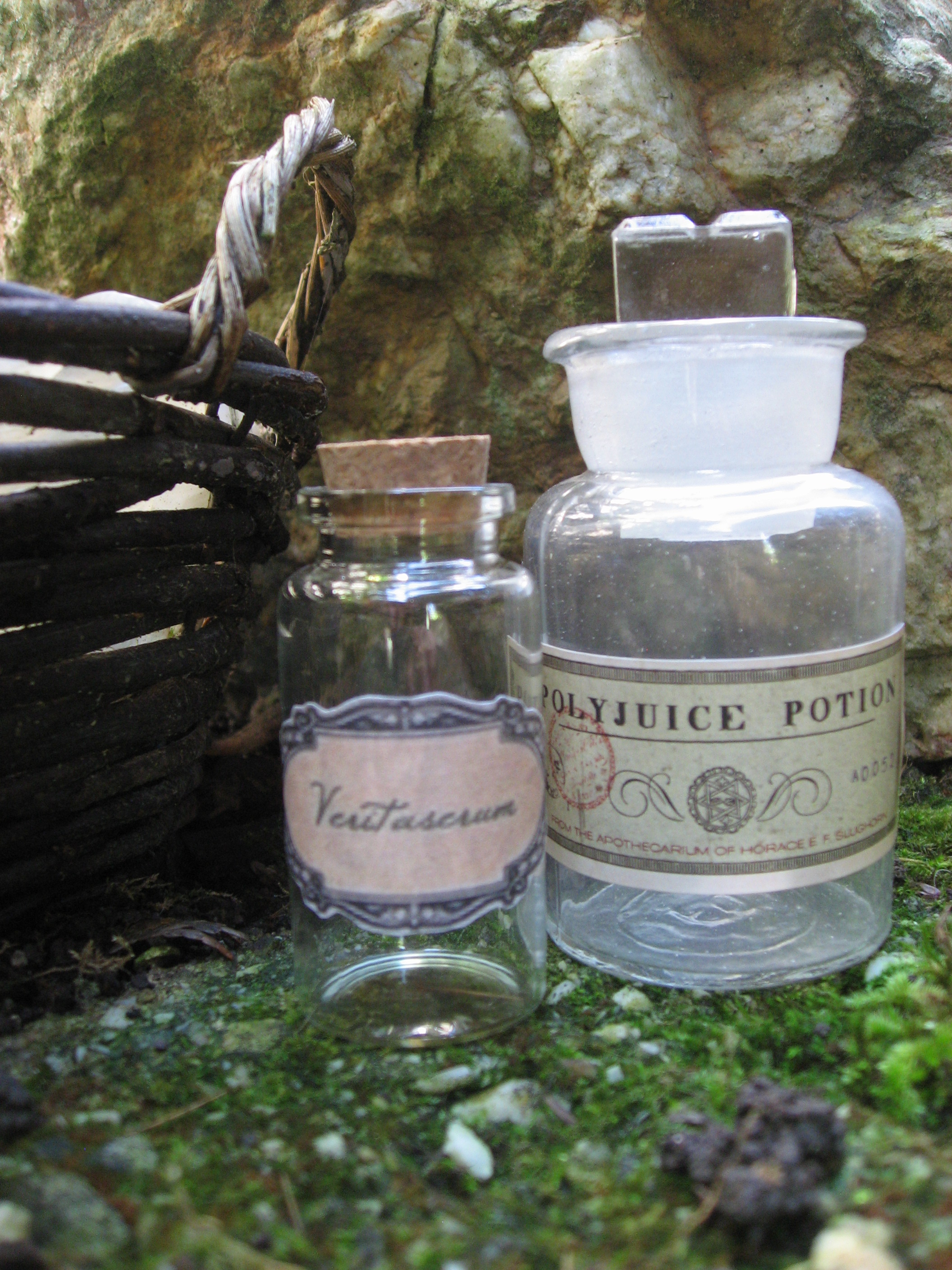 Customisation de fioles à l'effigie de Harry Potter.